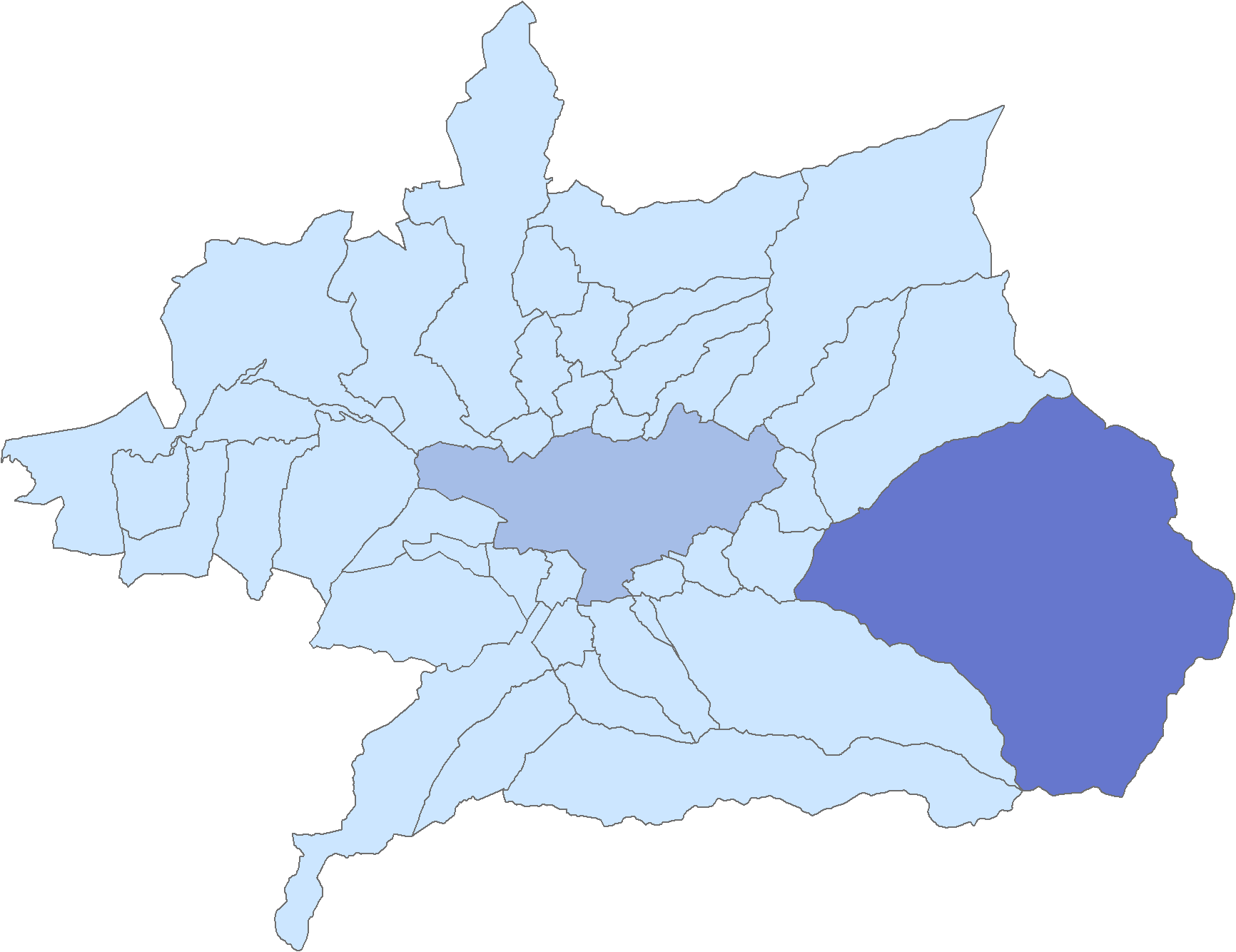 Situación del municipio de Güéjar Sierra respecto a la comarca de la Vega de Granada, en España.